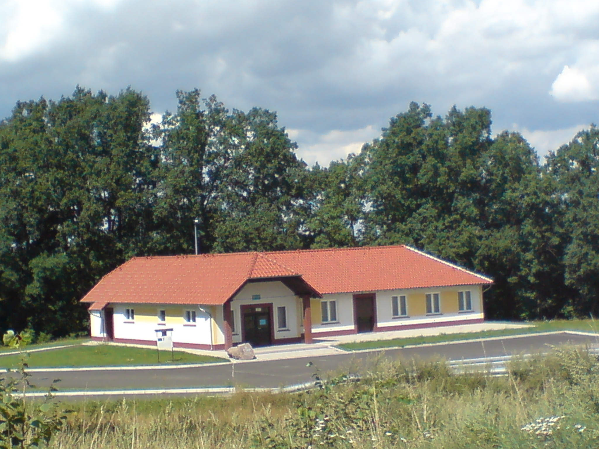 Dom ludowy w Golnicach. Powiat bolesławiecki.